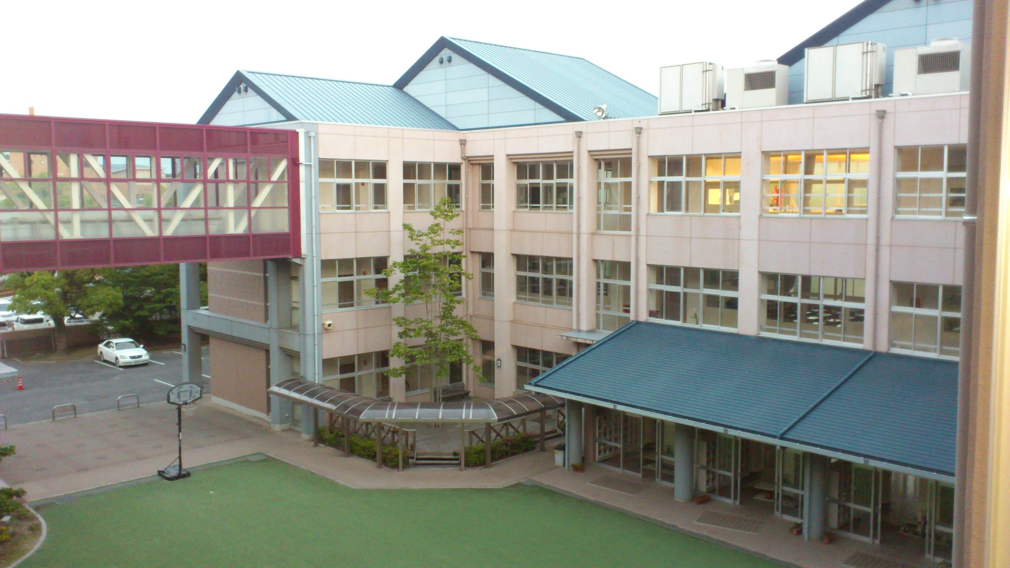 中庭の光景。人工芝であることが分かる。